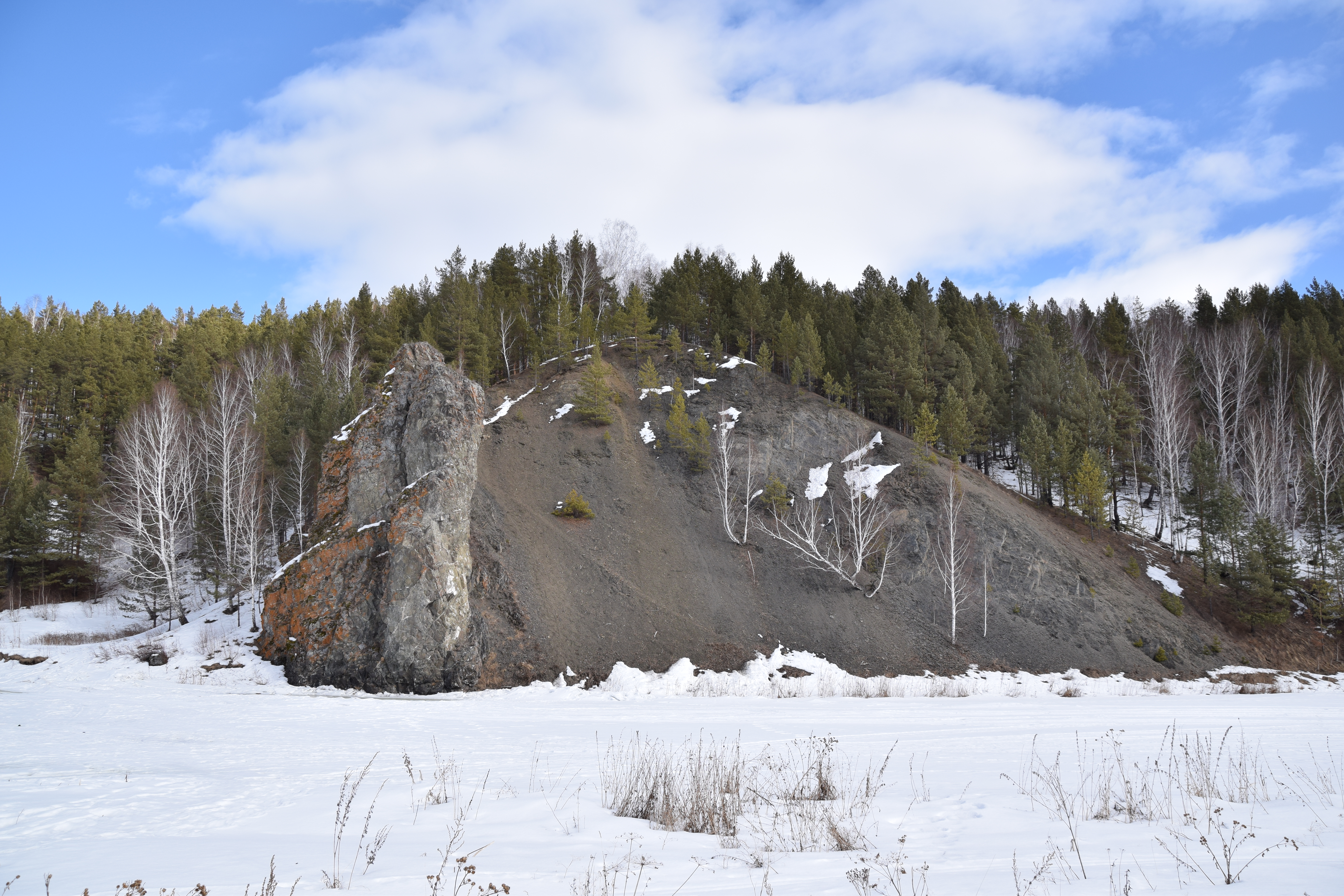 Скала "Каменный столб" (Смолинский камень)", Каменск-Уральский This image is related to the protected area of Russia number 6610294